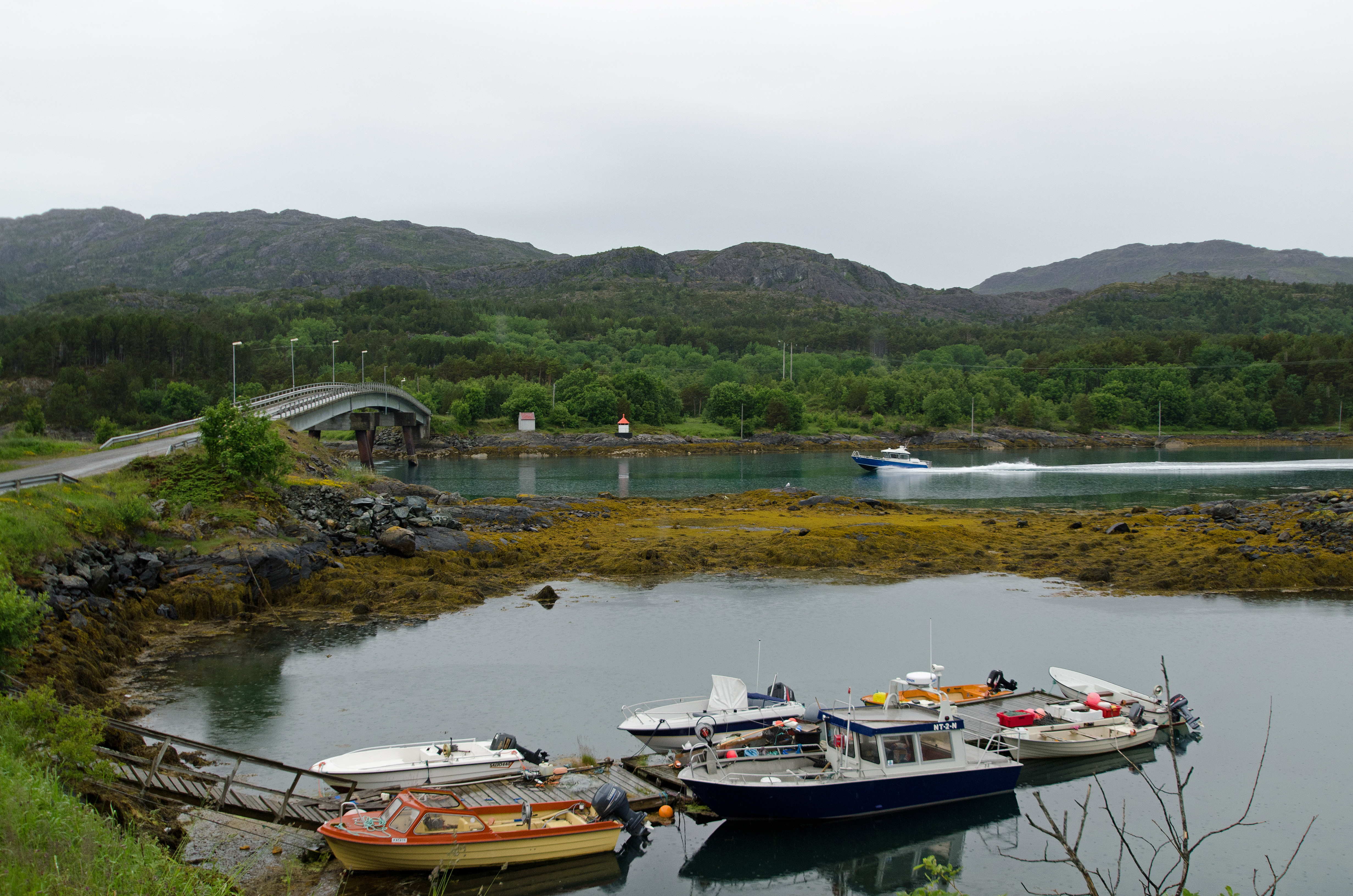 Frøviksundet between Frøvikøya and Leka islands